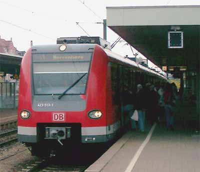 Stuttgarter SBahn S1, Plochingen - Esslingen - Stuttgart - Herrenberg, Typ: BR 423, Bahnhof Esslingen